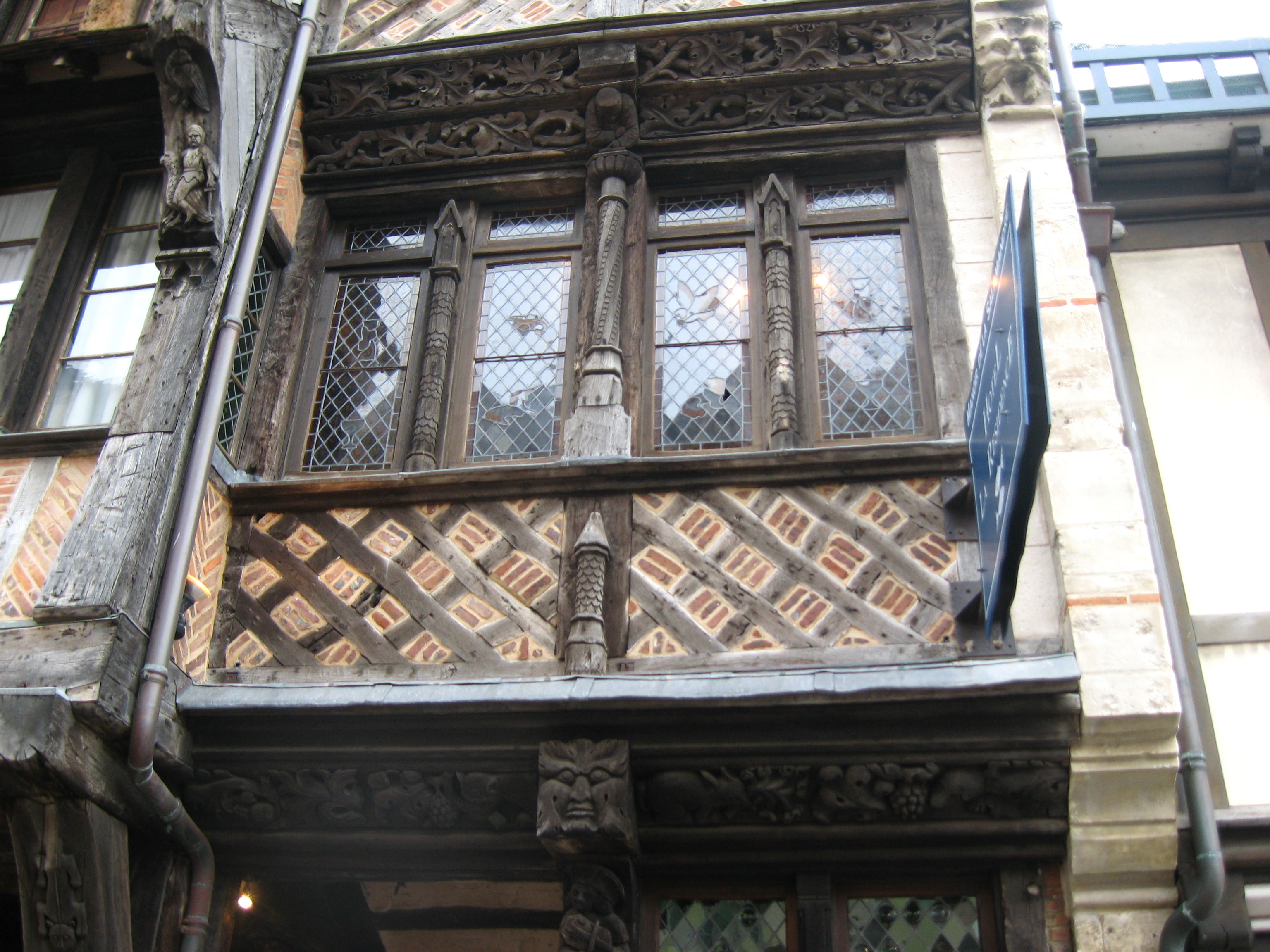 Mit normannischen Holzschnitzereien reich verziertes Gebäude aus dem 14. Jahrhundert in Etretat Datum: 22.05.2010 Urheber: Michael Pfeiffer Quelle: privates Fotoarchiv des Urhebers